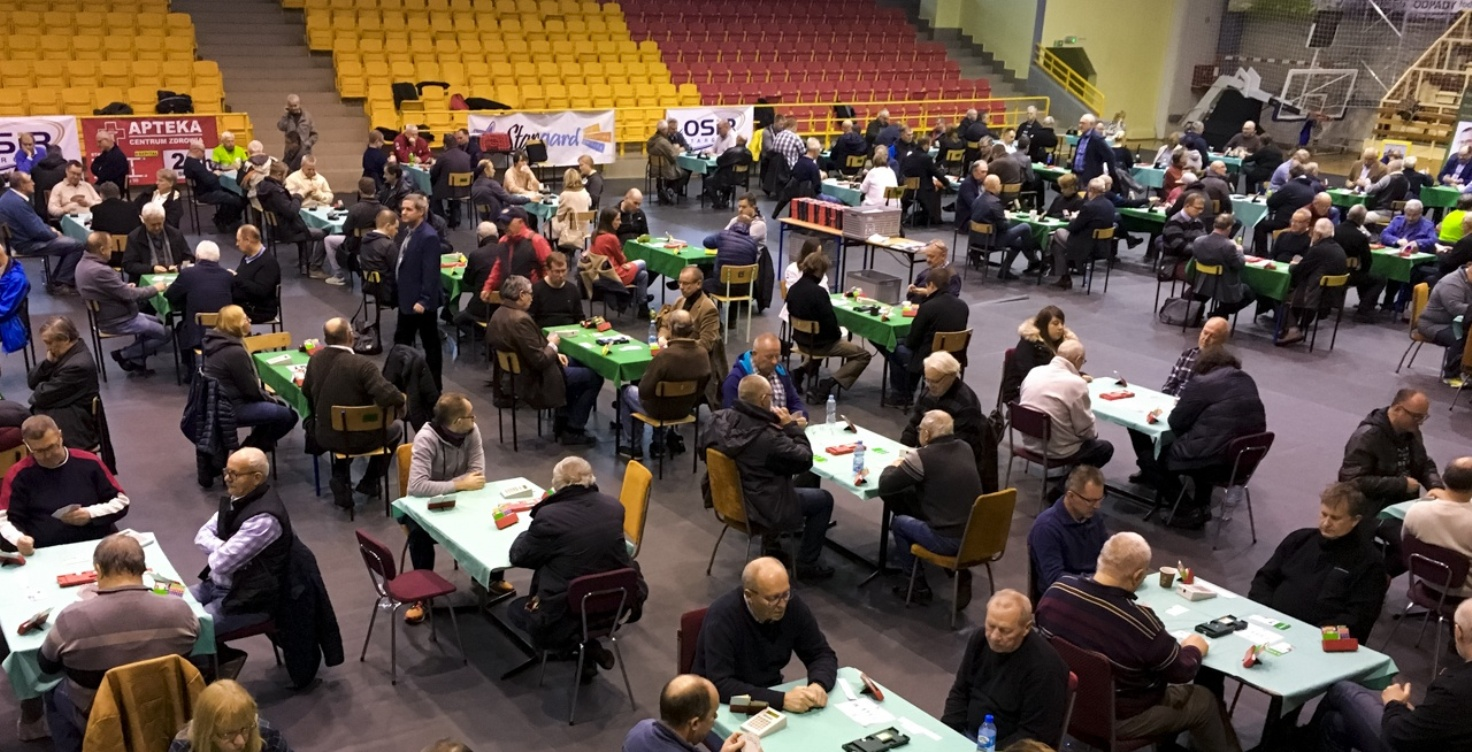 Memoriał brydżowy w Stargardzie